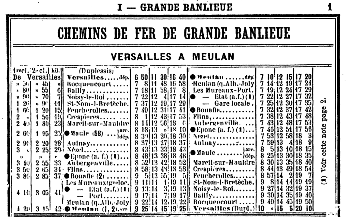 Horaires de la ligne Versailles - Maule - Meulan de la Compagnie des chemins de fer de grande banlieue